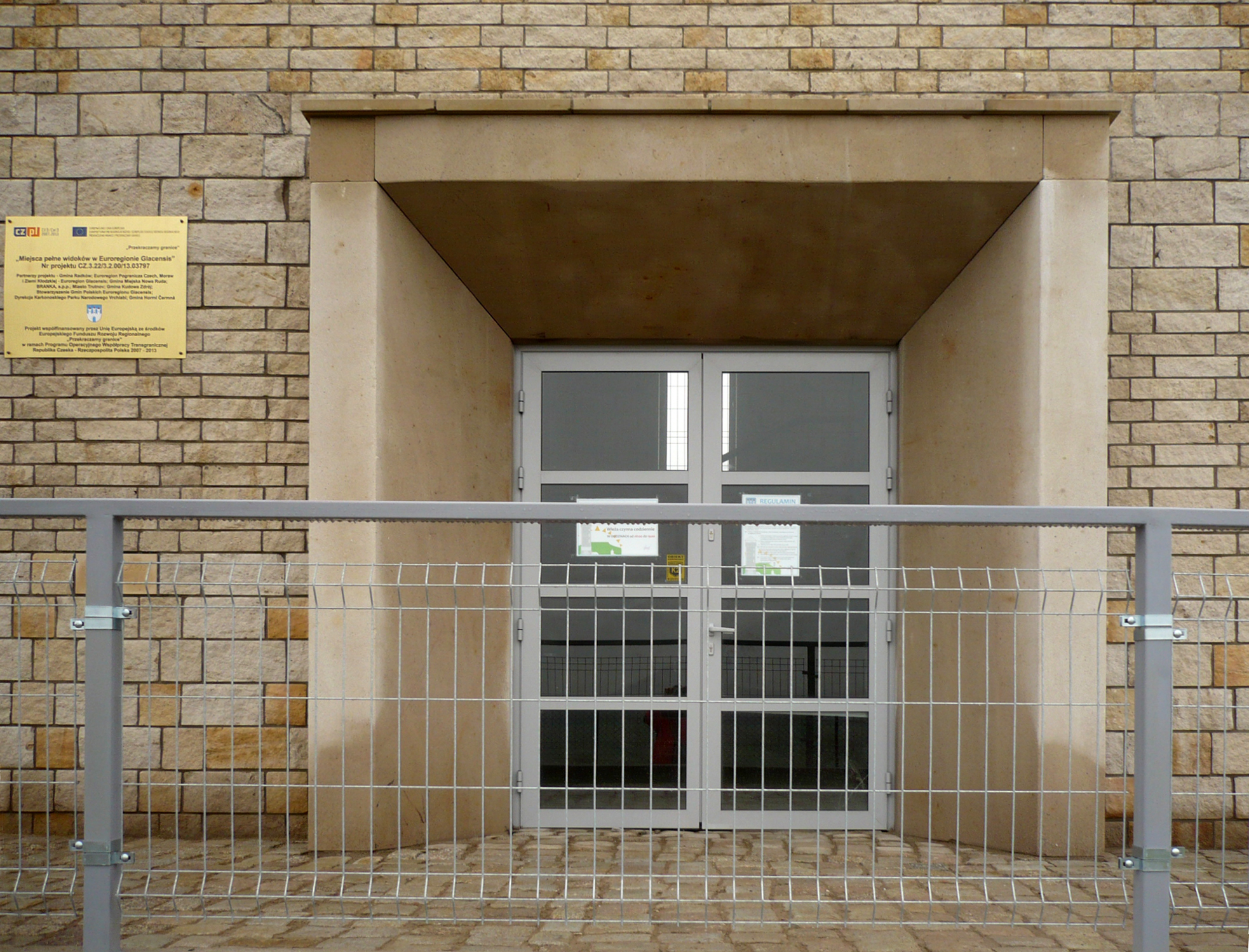 Suszyna - wejście do wieży widokowej Suszynka, 2014